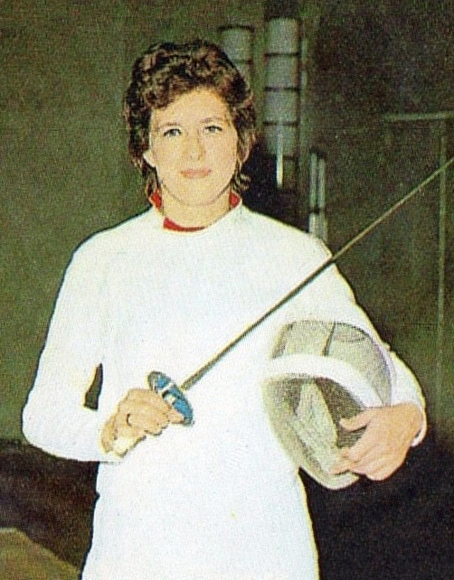 MUNCHEN/MONACO '72-PANINI-Figurina n.40- UJLAKI REJTO - UNGHERIA - SCHERMA -Rec